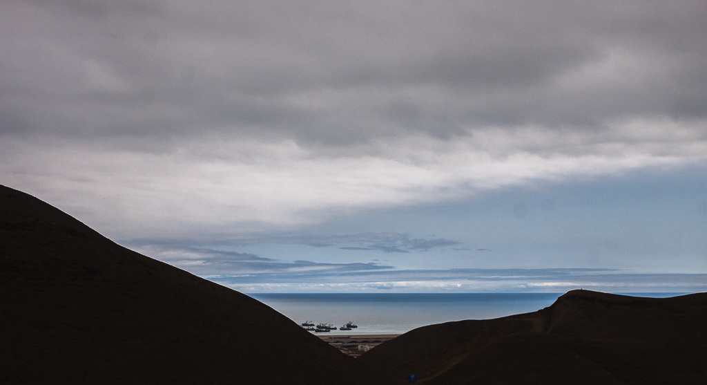 Océano Pacífico desde el mirador de la Huaca Paraíso